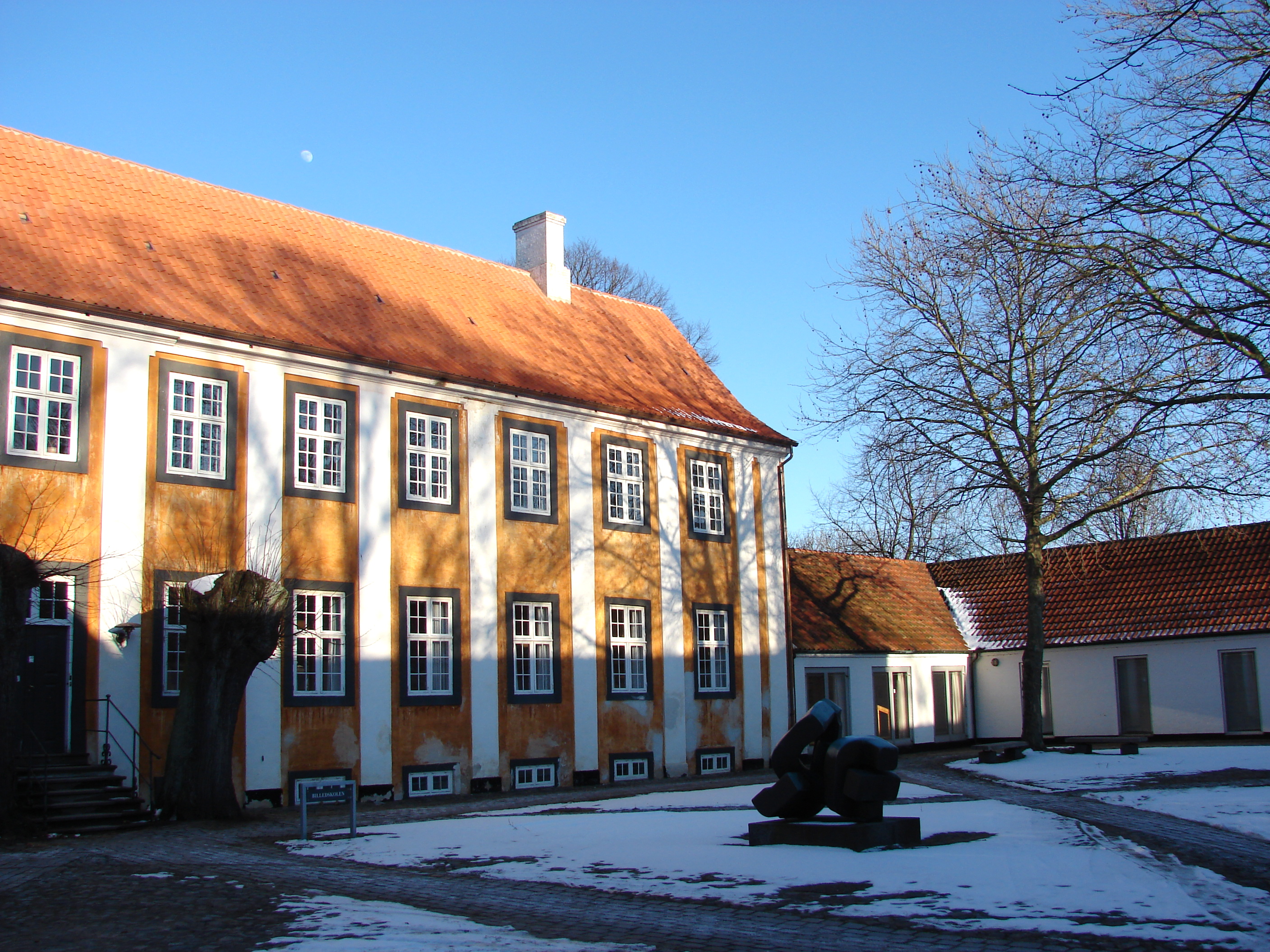 Kastrupgårds indre gård, Kastrup, Amager ved København